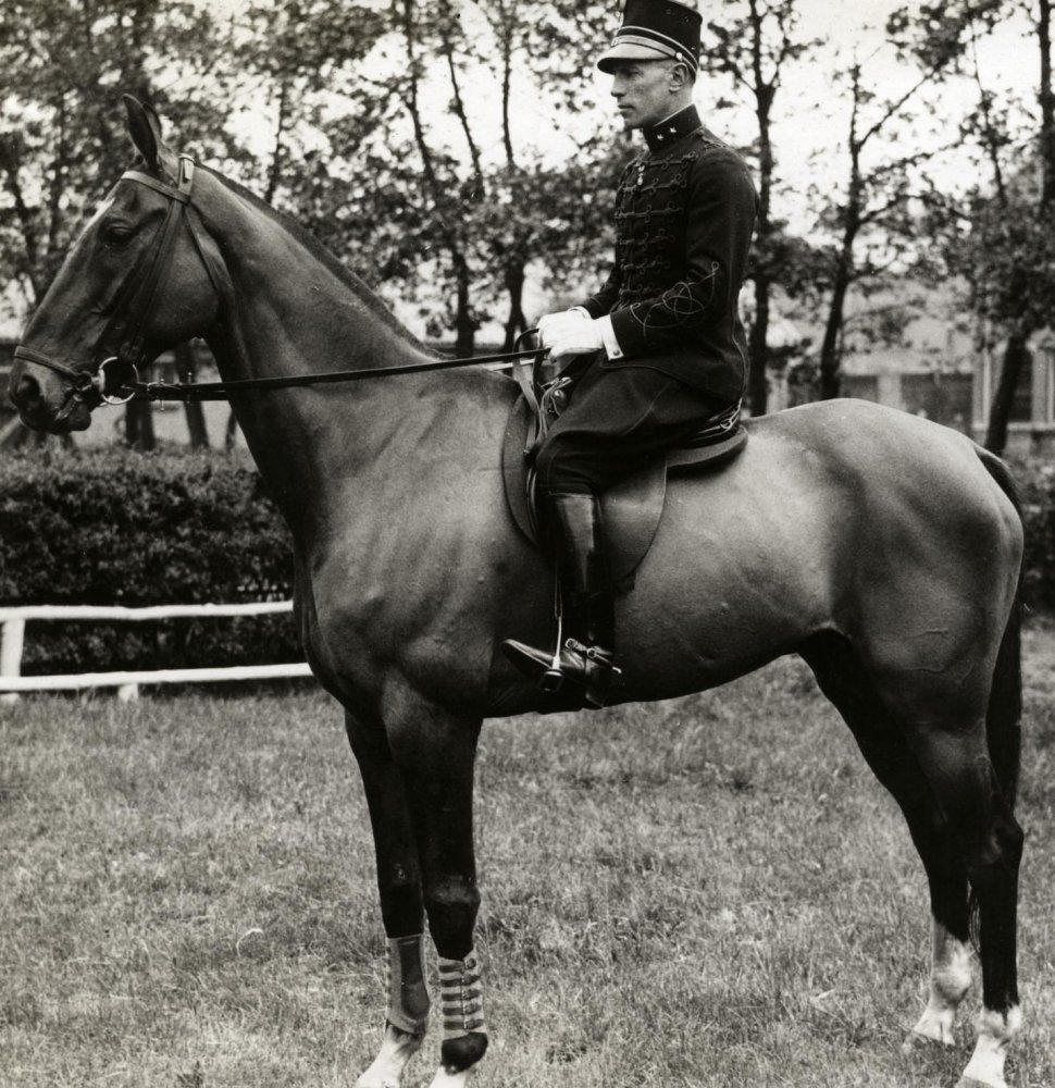 Luitenant Pahud de Mortagne van het Indische leger, Olympisch kampioen paardrijden. Nederland, plaats onbekend, 1932.